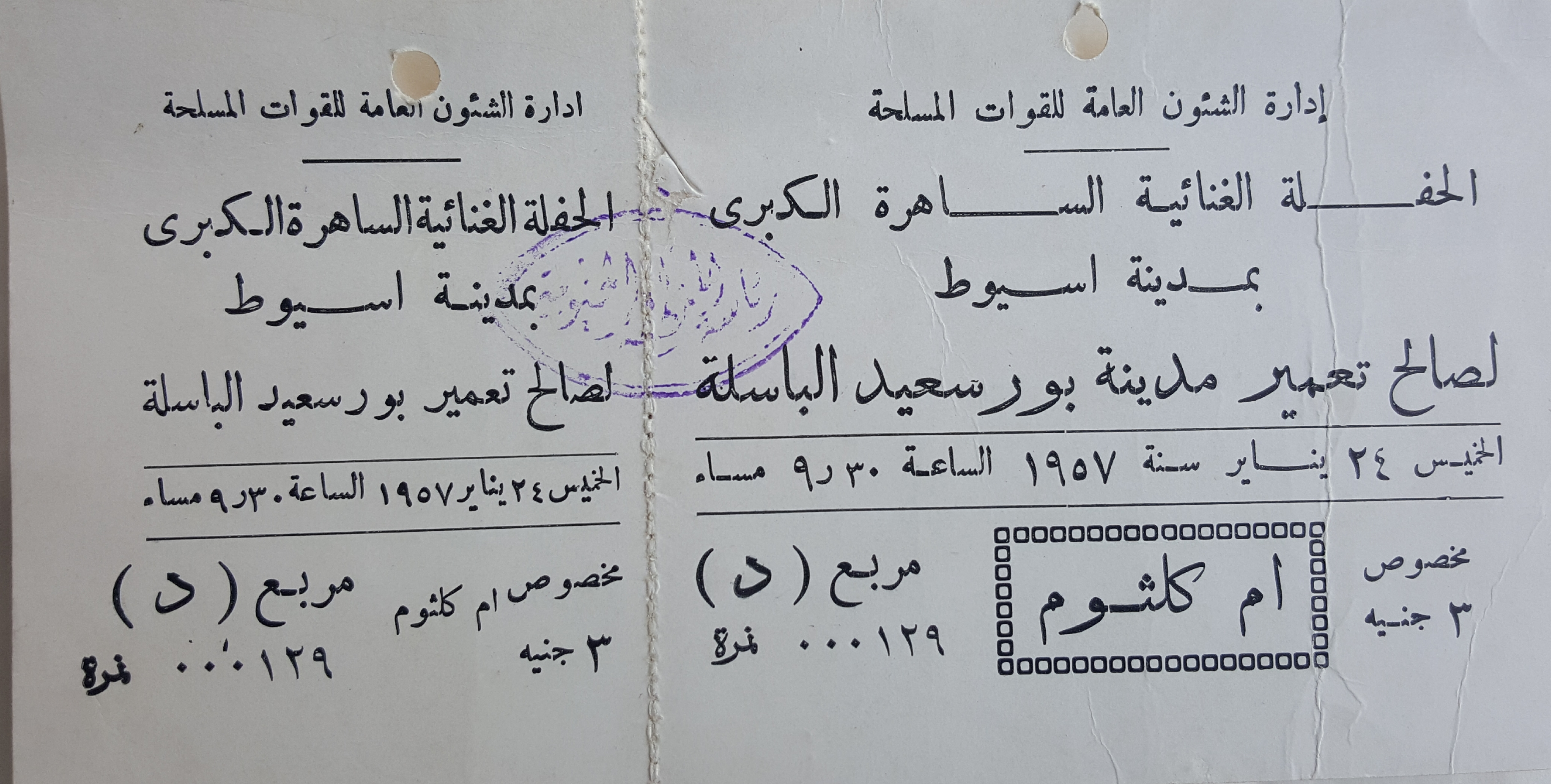 مصرى: تذكره لحفلة ام كلثوم